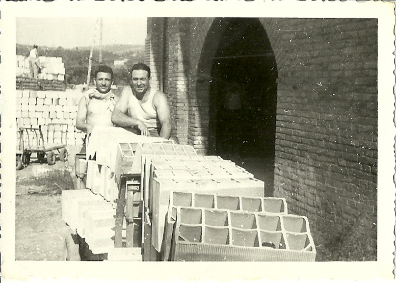 Operai della Fornace Frazzi trasportano dei mattoni di tipo Foratone